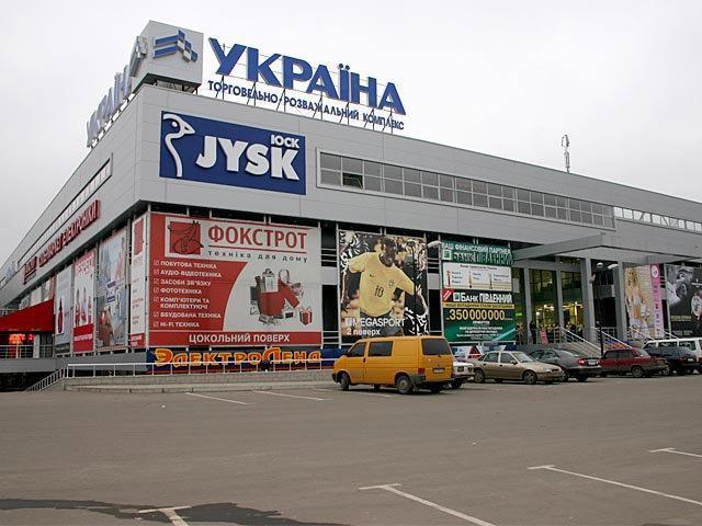 Торгівельно-розважальний комплекс «Україна» у Харкові.